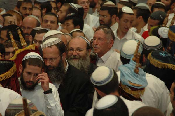 ישיבת מרכז הרב.